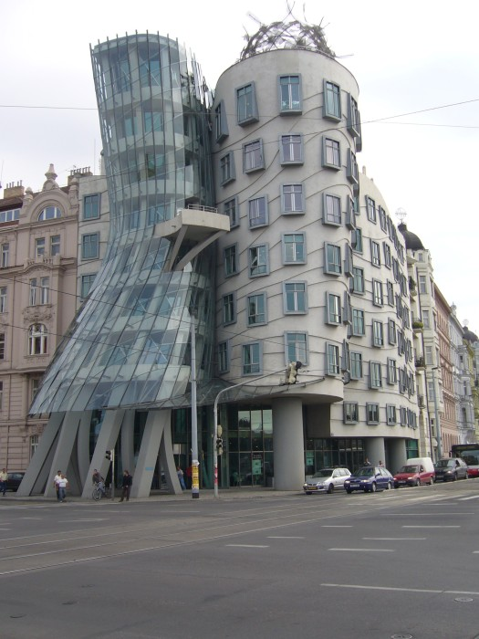 Photo of Tančící dům in Prague, Czech Republic